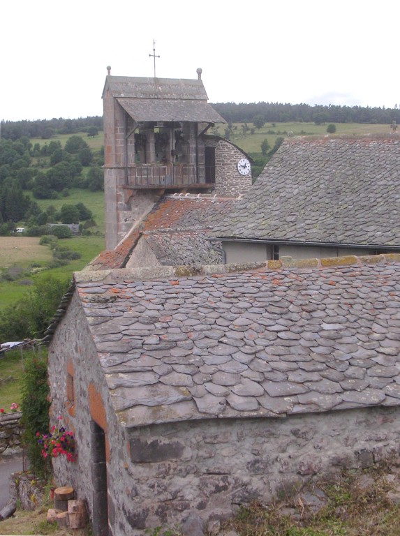 L'église et le four à pain de Mouret - Chalinargues (15) Cézallier - France